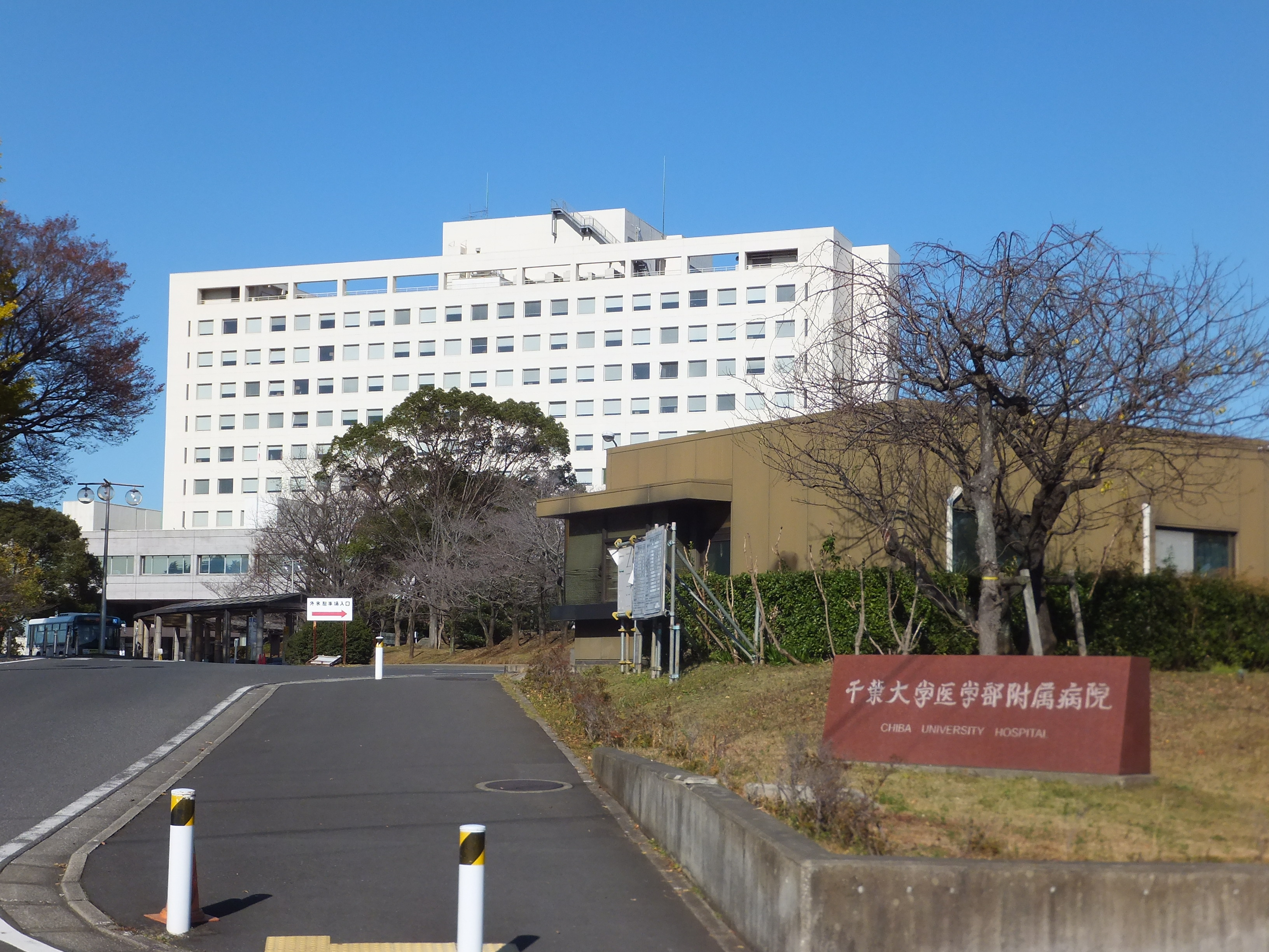 千葉大学附属病院